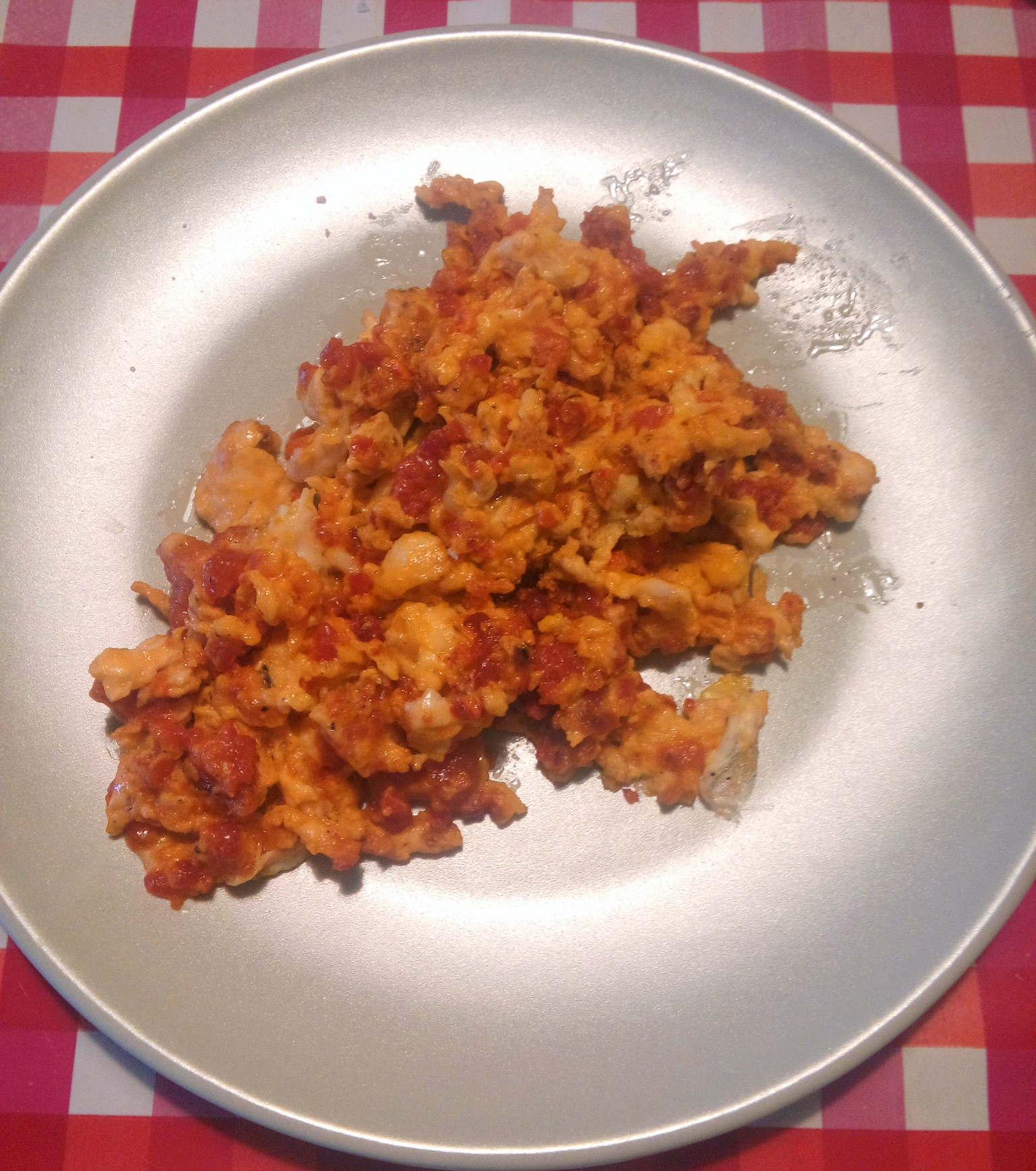 Desayuno típico peruano